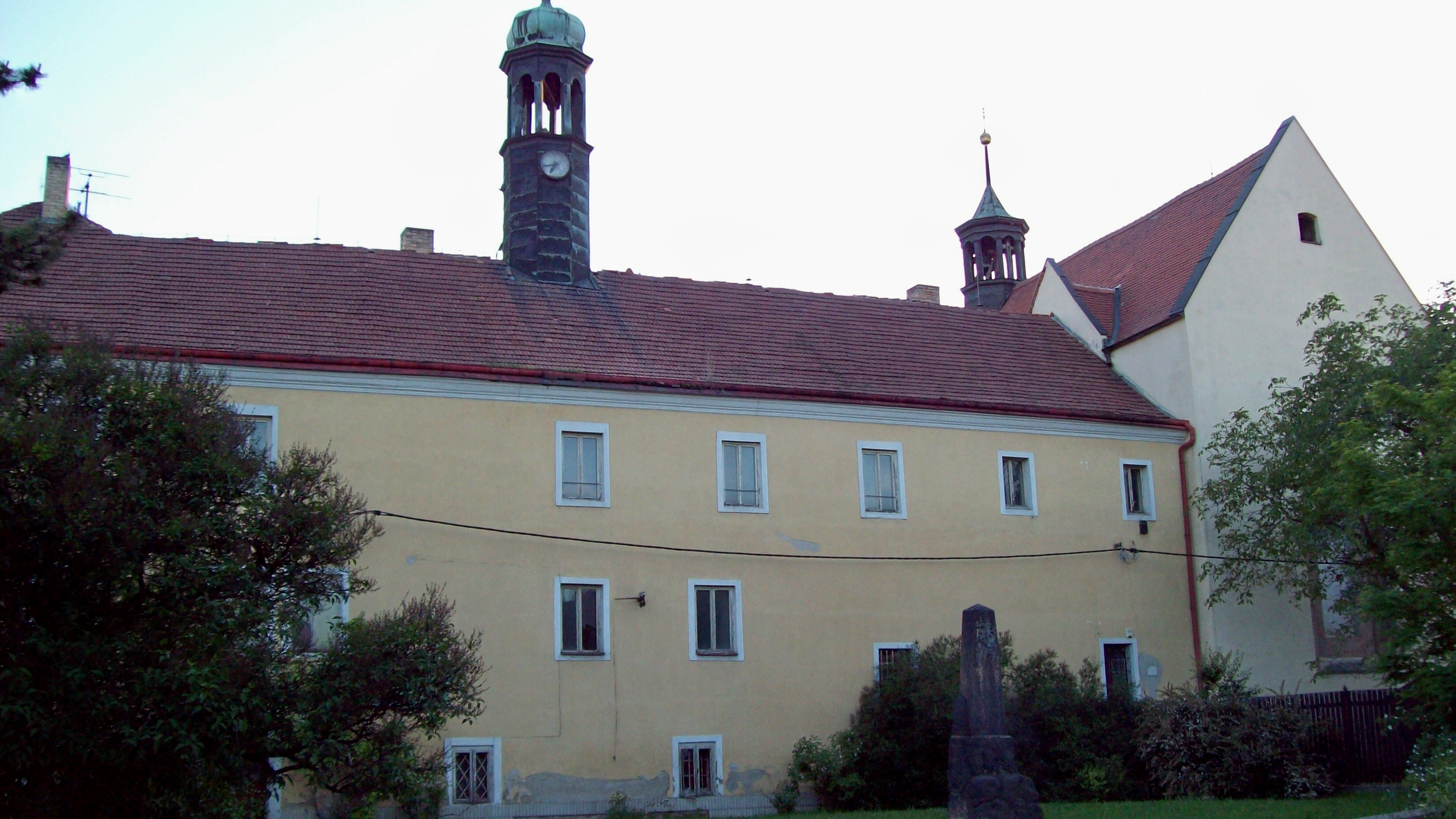 Bývalý augustiniánský klášter založený na Pšovce roku 1268 a zrušený 1789. Klášter byl součástí kostela sv. Vavřince na Mělníku-Pšovce.